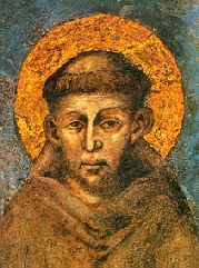 Franciscus van Assisi, zoals hij door Cimabue (1240-1302) is afgebeeld in de benedenkerk van de Franciscusbasiliek in Assisi als onderdeel van een groter fresco.